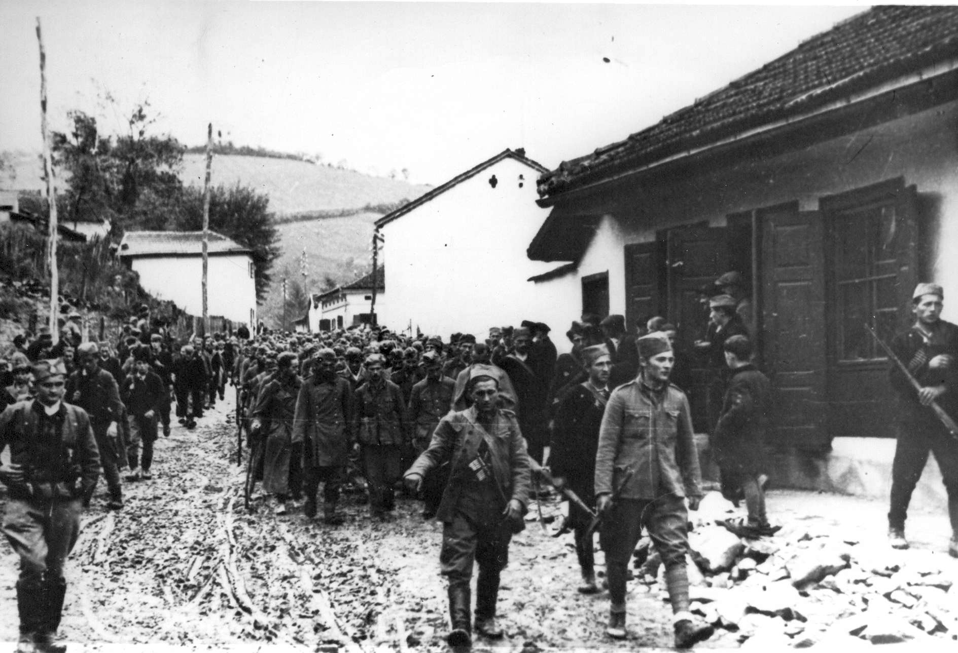 Srpskohrvatski / српскохрватски: Srpski ustanici (partizani i četnici) sprovode zarobljene Nemce kroz Užice 1941.